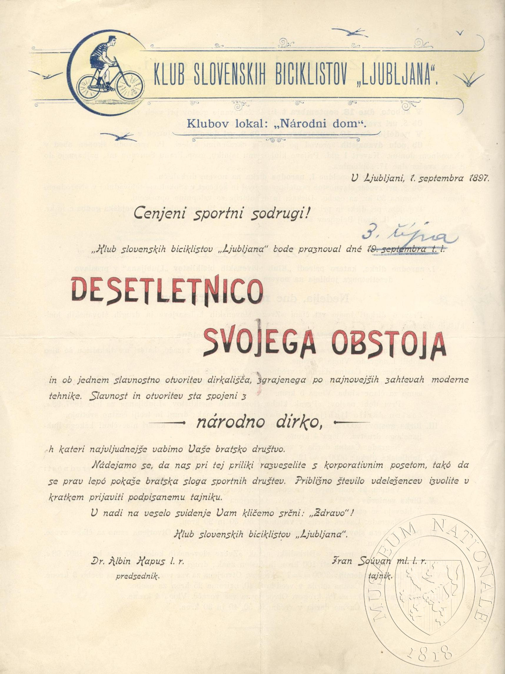 Klub slovenskih biciklistov Ljubljana ob desetletnici.